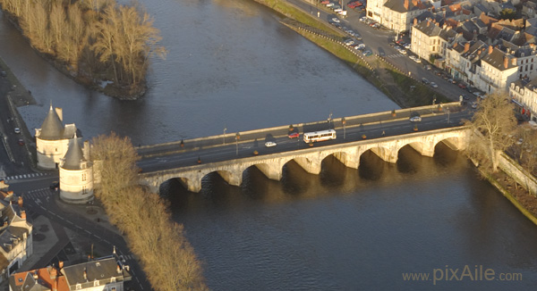 Vue aérienne oblique sud du Pont Henri IV, à Châtellerault.